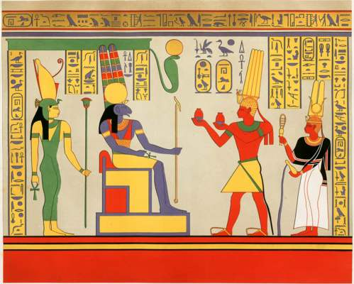 Taharqa followed by Queen Takahatamun at Gebel Barkal.